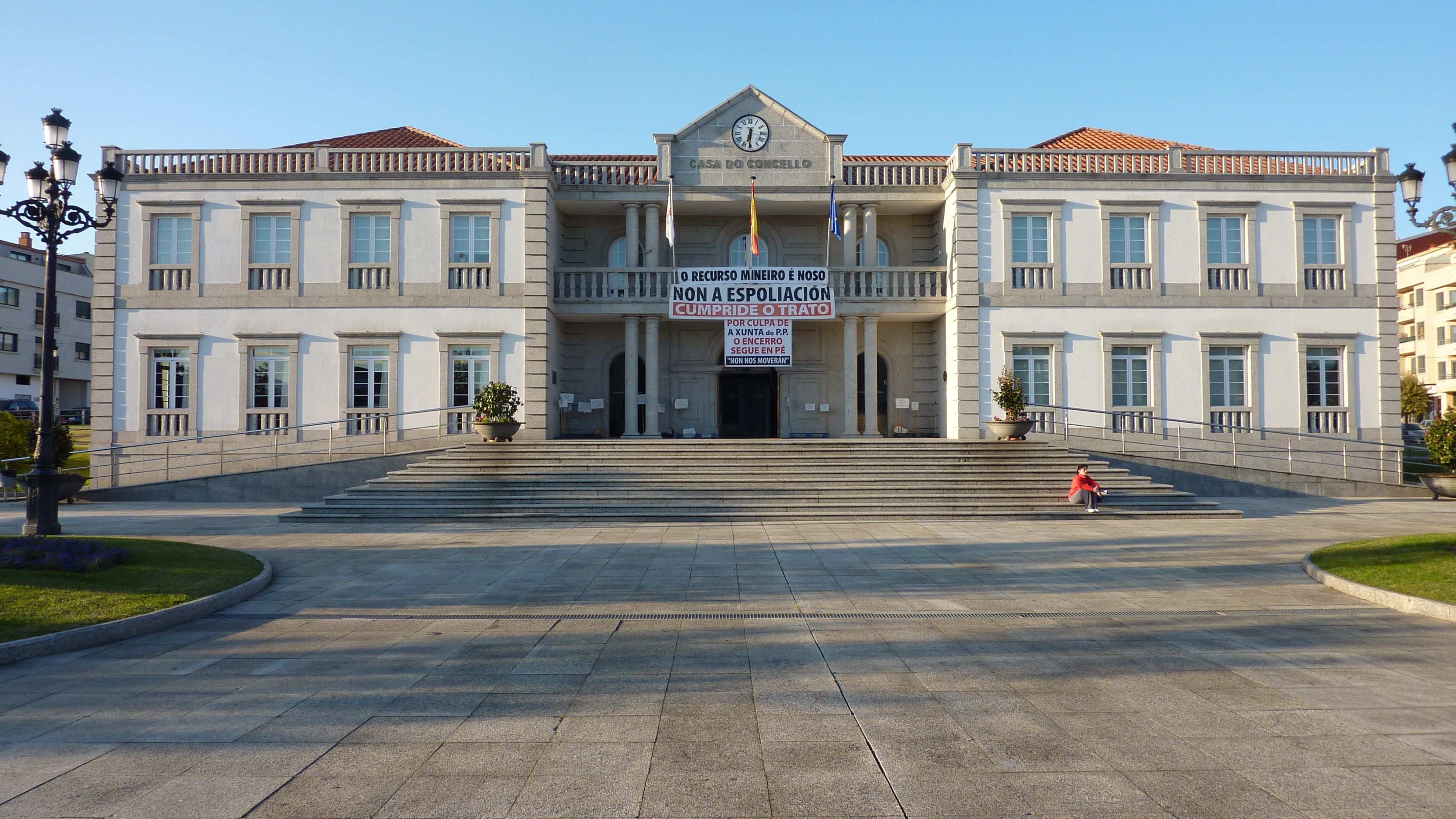 Casa do concello de Salvaterra de Miño (Pontevedra)